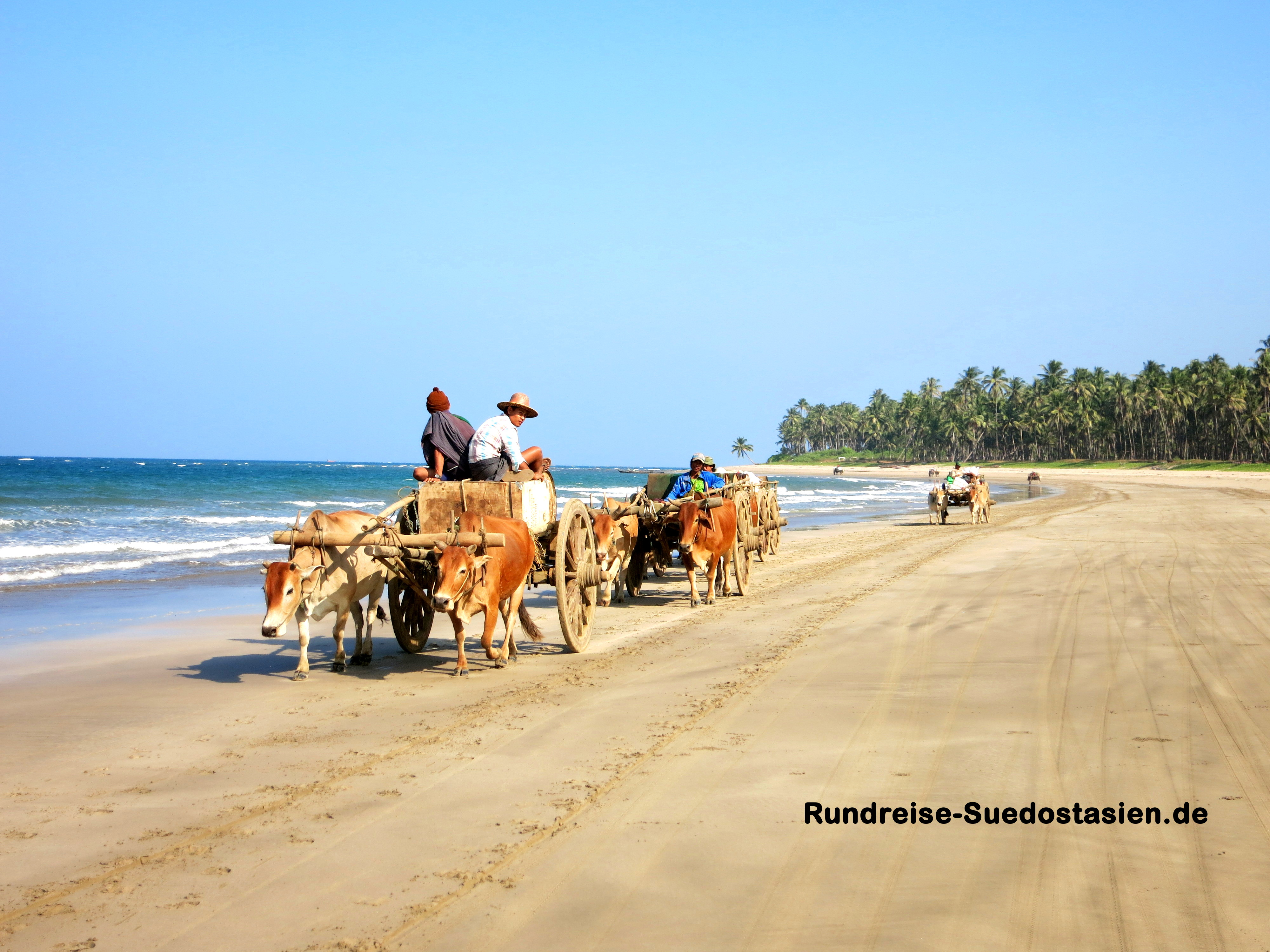 Der Strand von Ngwe-Saung wird von vielen Einheimischen als Straße verwendet.